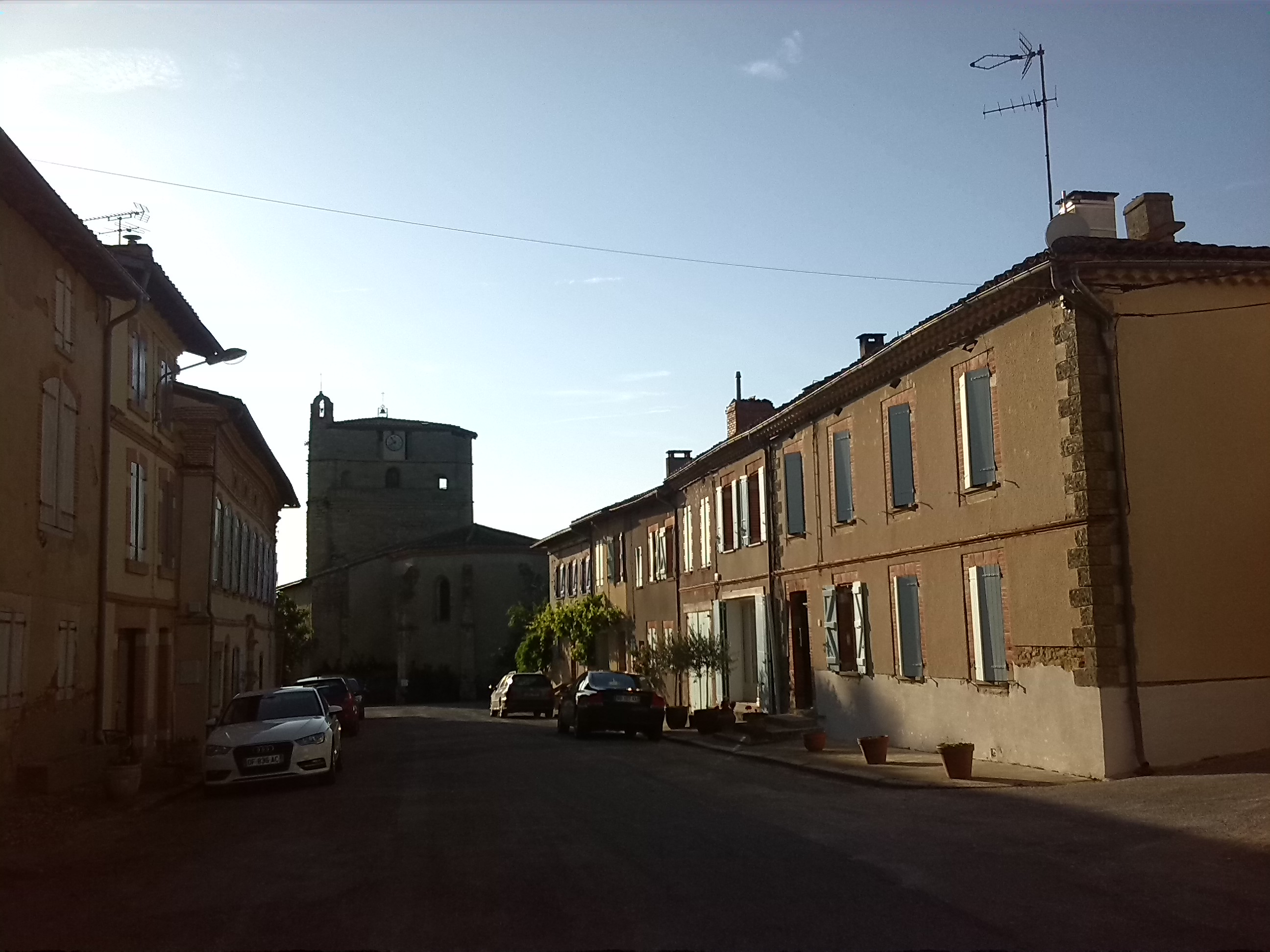 ĝenerala vido de la ĉefa loĝnukleo de Belcastel kaj fone la kastelo-kirko